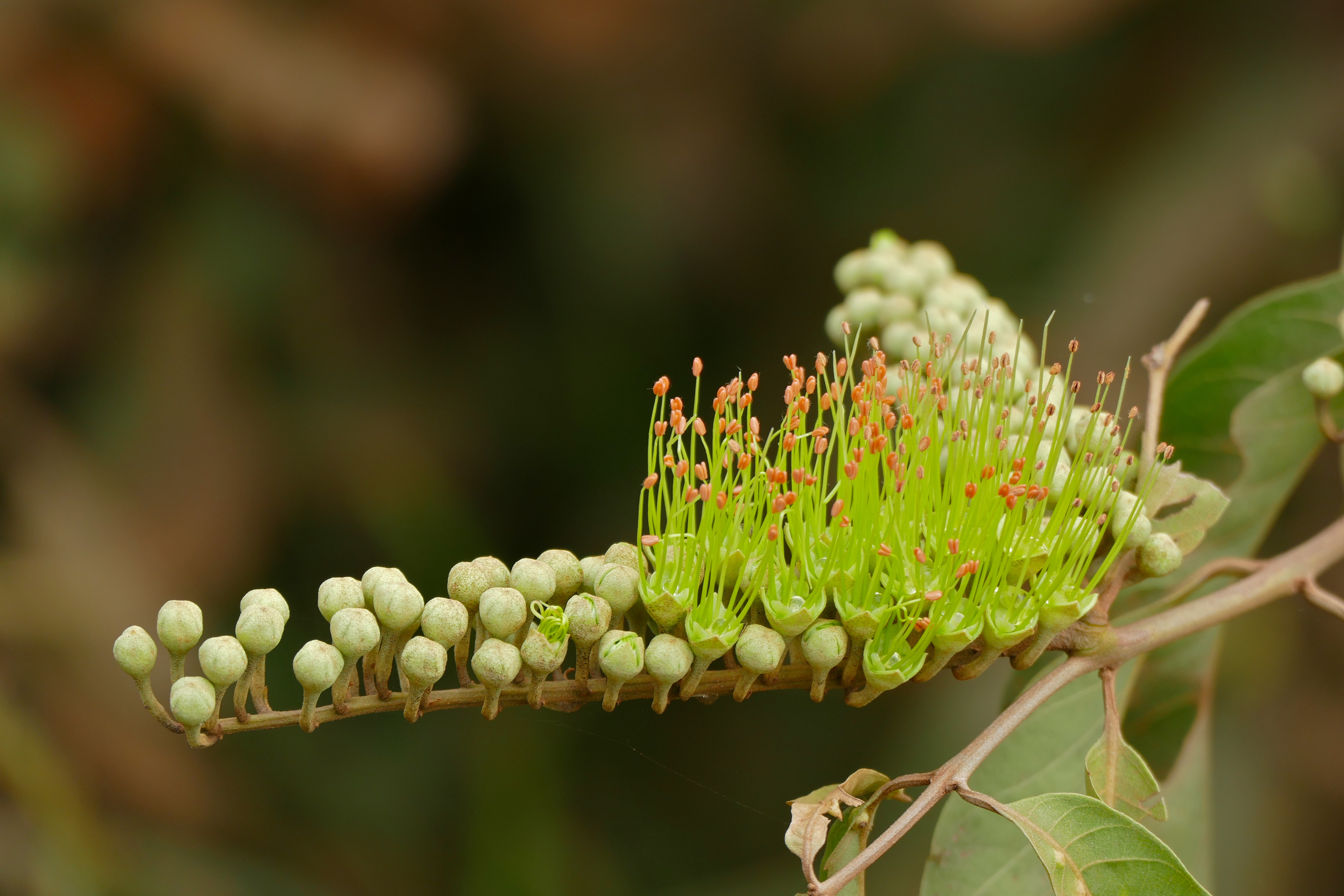 Parque Baia das Pedras Access Road, Porto Cercado Area, Poconé, Mato Grosso, BRAZIL